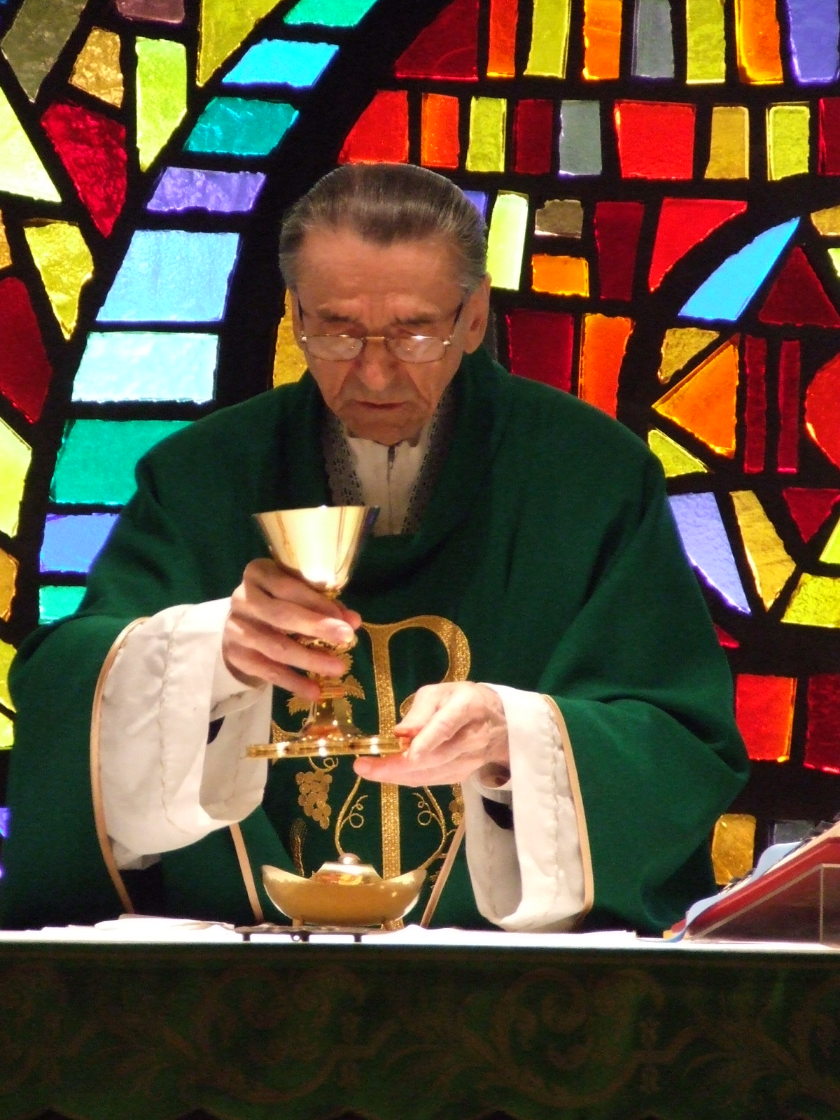 Teres Ágoston misézik